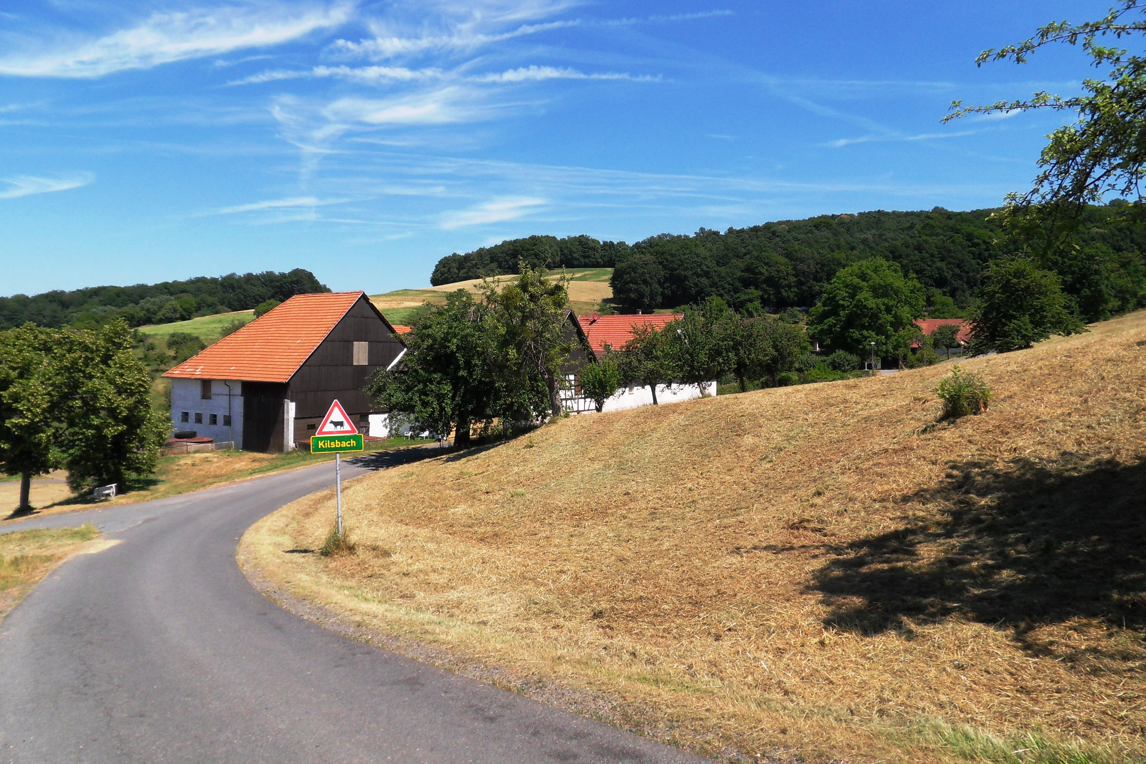 Blick von Südwesten, aus Richtung Affhöllerbach kommend, auf den Weiler Kilsbach